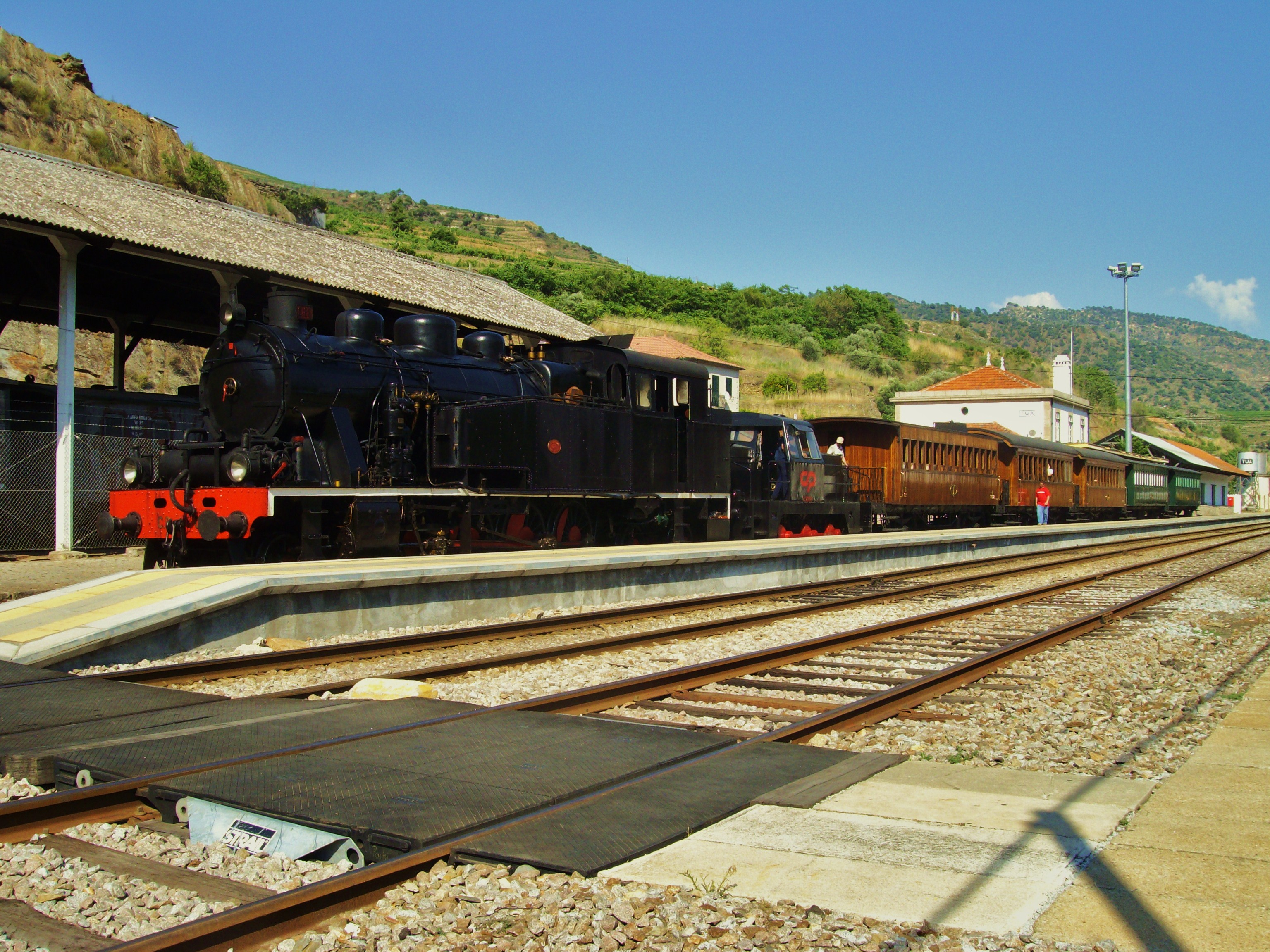 Cada Fin de Semana, desde Marzo hasta octubre, surca desde Régua hasta Tua este precioso tren histórico. La composicion al componen una Henshell & Sohn de 1925, un Sentinel 1150 como apoyo y 5 coches de madera reformados por EMEF. Como dice el título...la temperatura rozaba los 40ºC...menos mal que habia un bar abierto cerca... :)